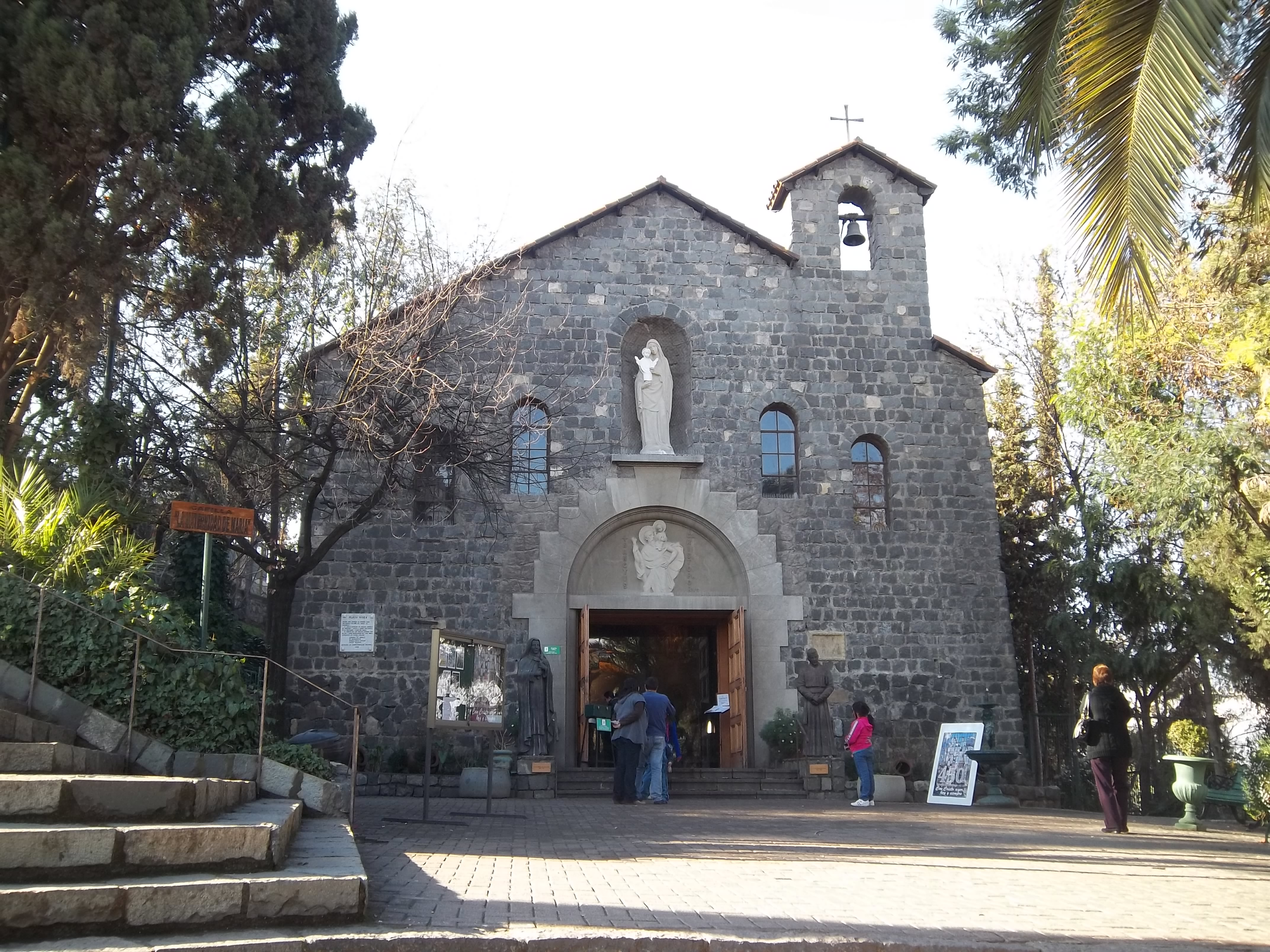 Santuario del Cerro San Cristóbal en Santiago de Chile, Región Metropolitana, Chile.